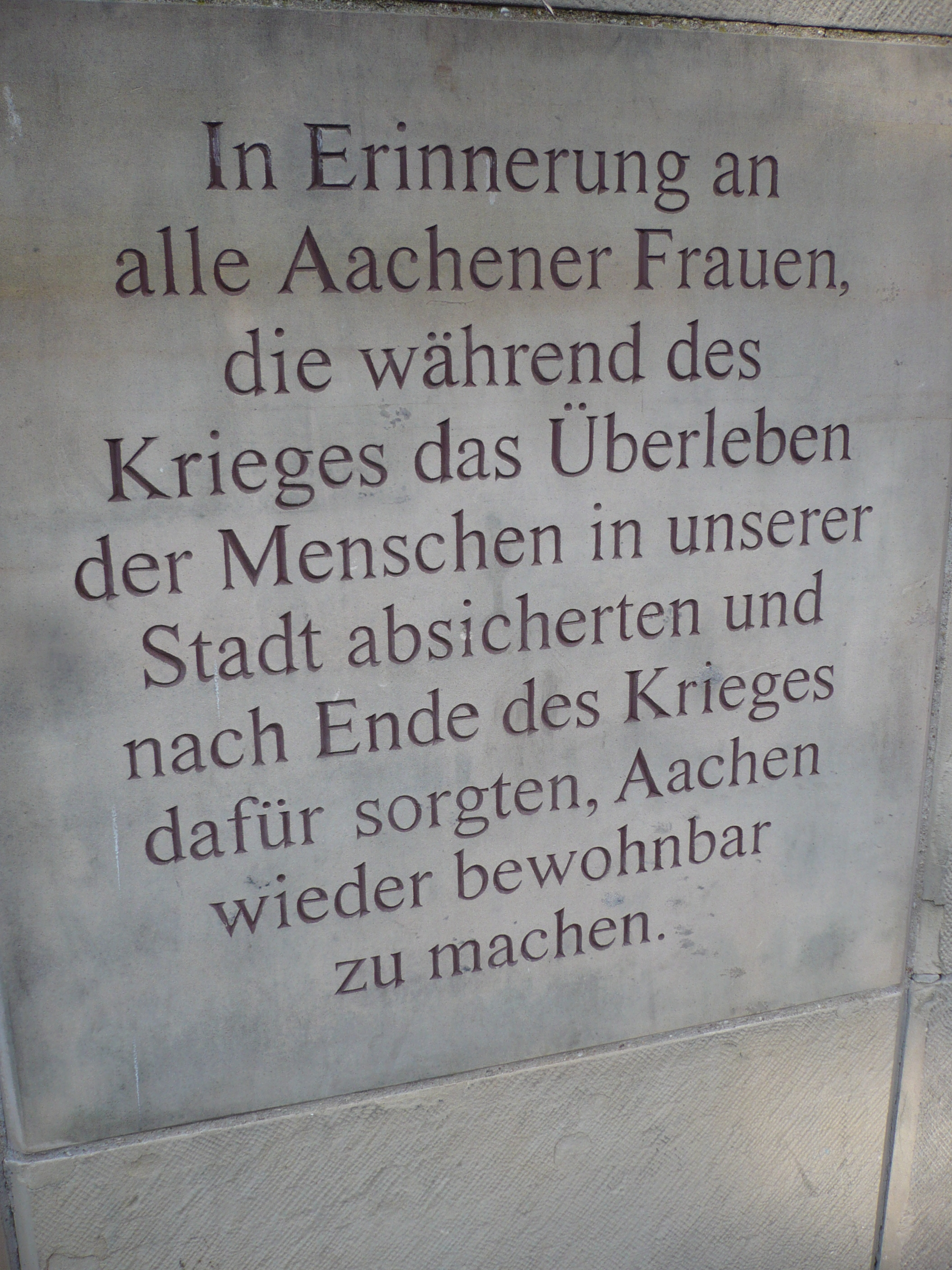 [Gedenkstein "Aachener Frauen" (allgemeiner auch "Trümmerfrauen") am Aachener Katschhof vor der Rückseite des Aachener Rathauses.